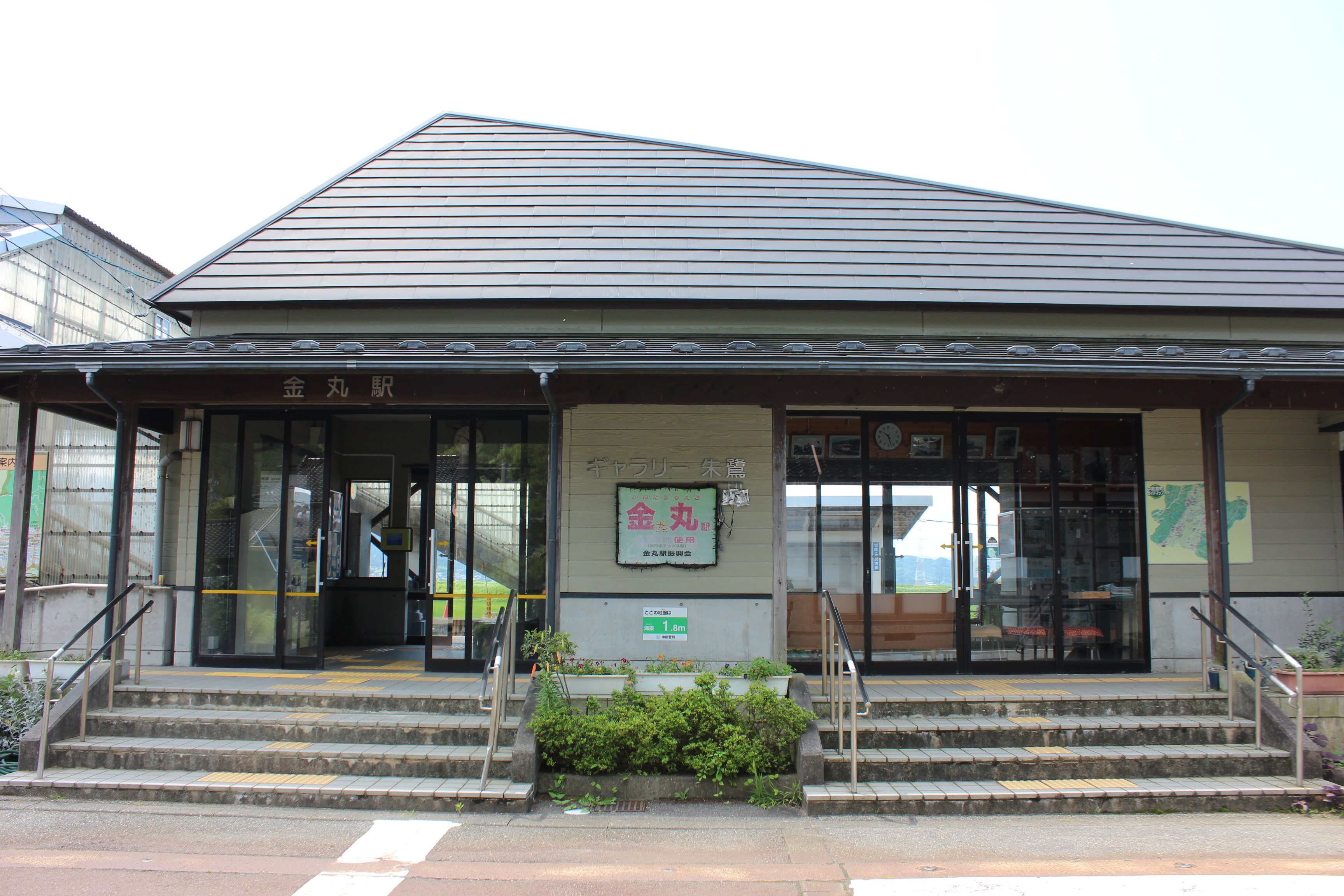 金丸駅（石川県鹿島郡中能登町）、駅舎内に「ギャラリー朱鷺」を併設している。 Canon EOS Kiss X5